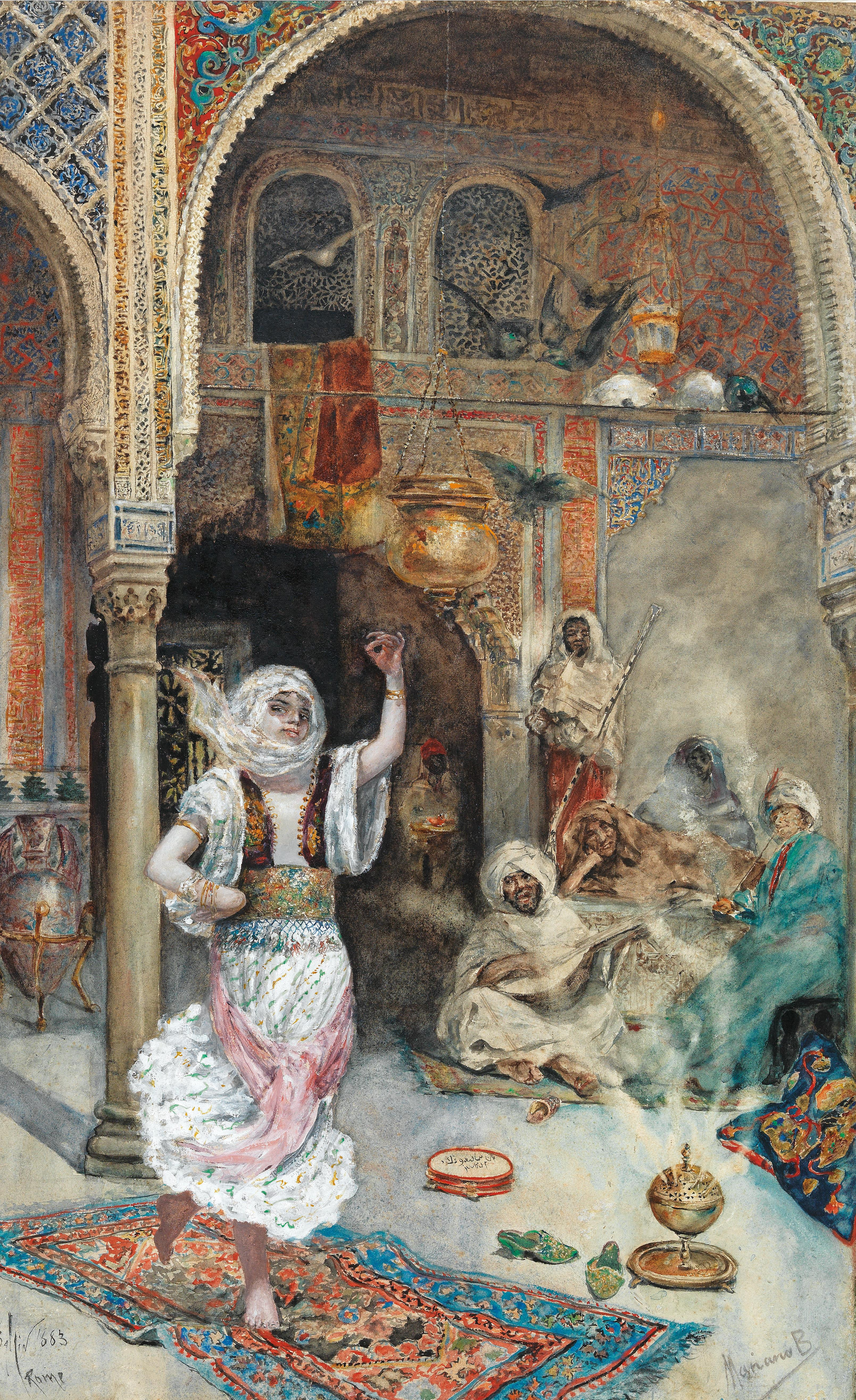 Orientalischer Tanz, signiert, datiert und bezeichnet Mariano B. 1883 Rome, undeutlich bezeichnet Ballin, Mischtechnik auf Papier, 91 x 57 cm